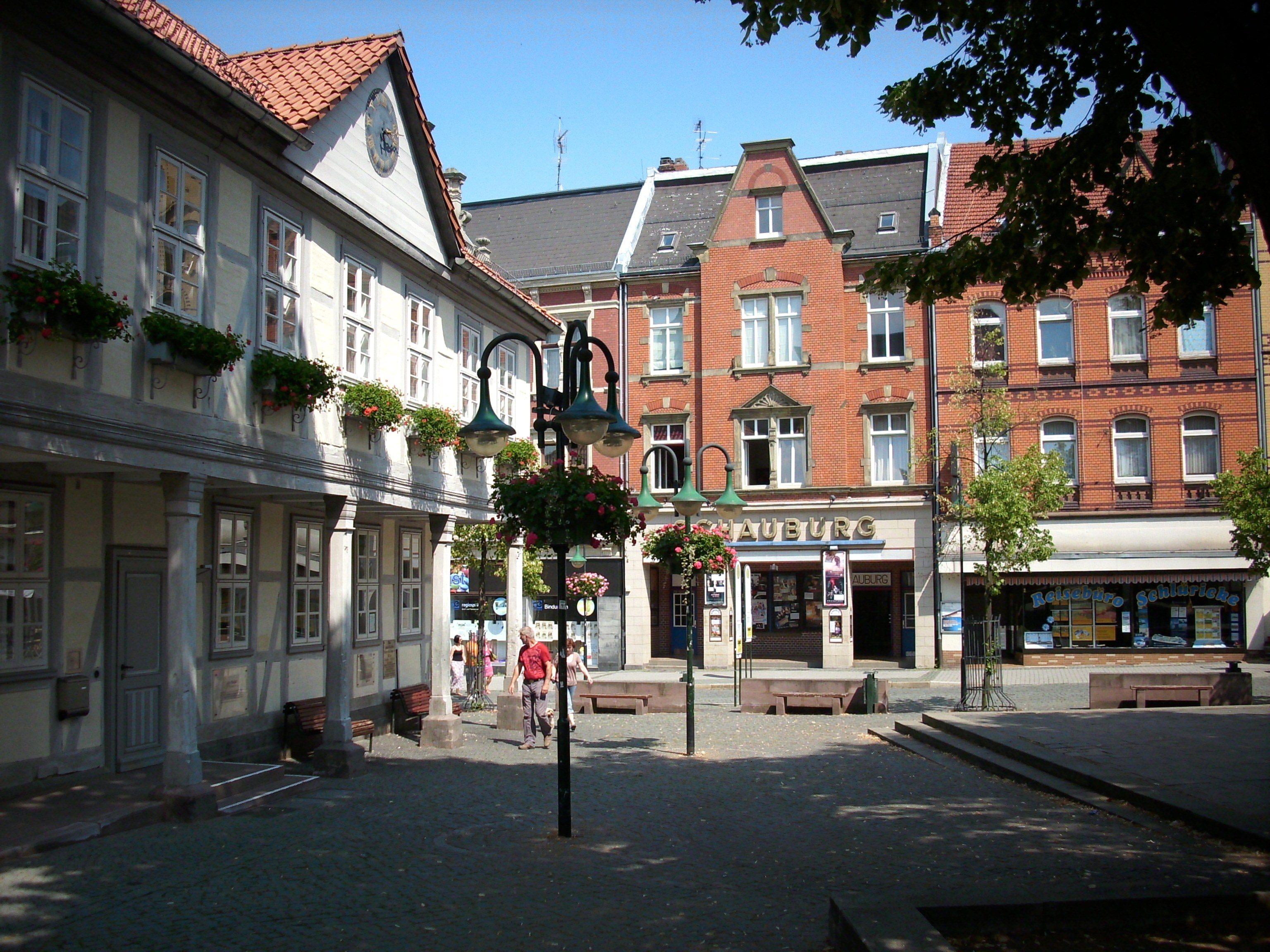 Das Northeimer Kino von der Alten Wache aus gesehen.